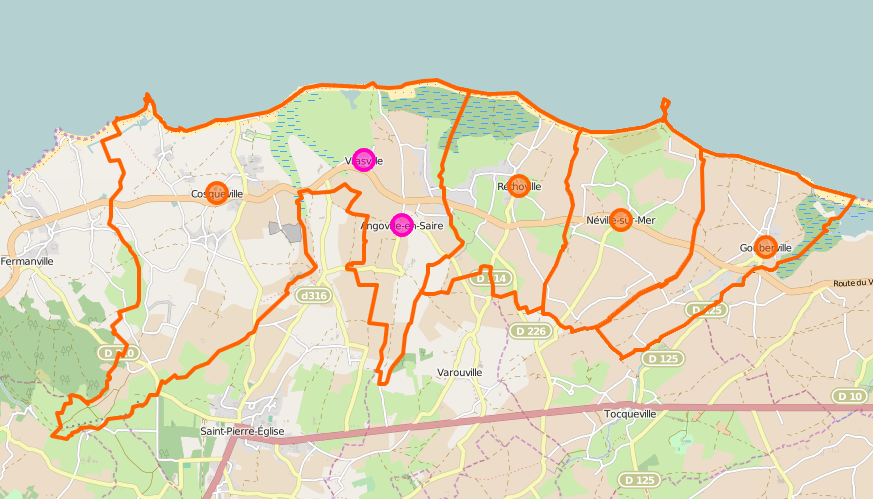 Carte de la nouvelle commune de Vicq-sur-Mer et ses communes associées